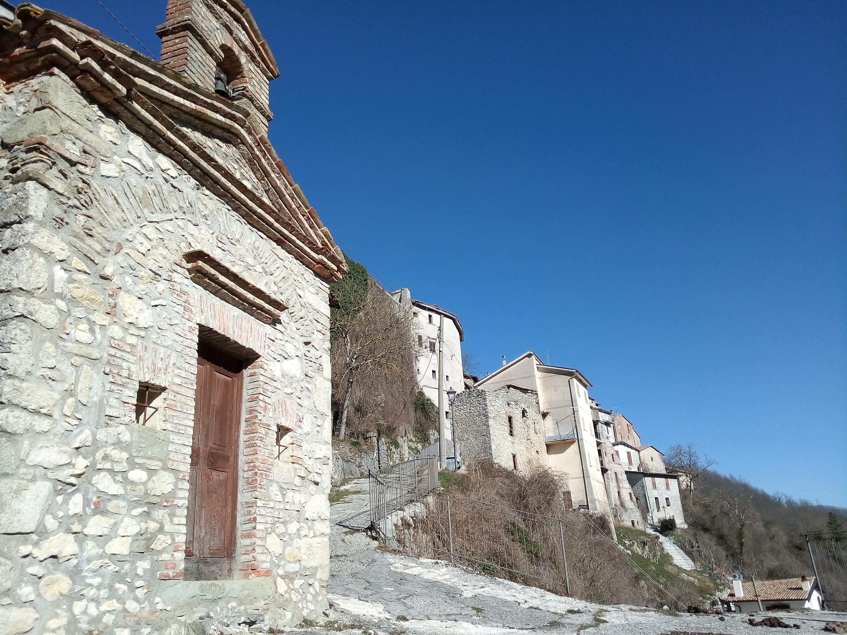 Veduta del borgo antico di Ricetto (Lazio)